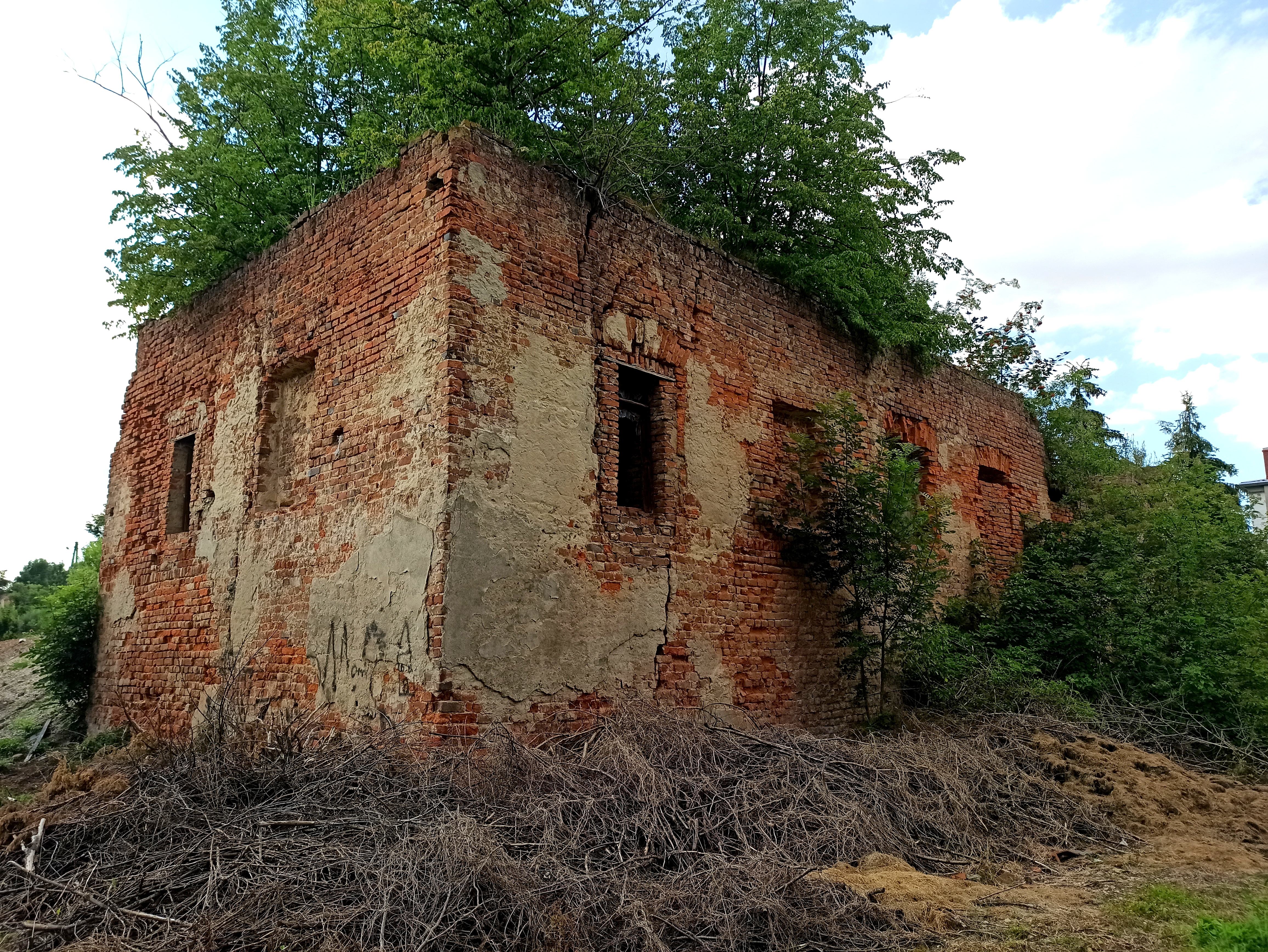 Prężynka, oficyna pałacowa (nr 49), poł. XIX w. – ruina. 06.1965.